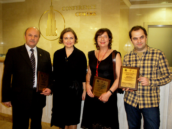 Президент Фонда Ольга Юлиановна Семенова с лауреатами премии-2013 (слева направо - Николай Иванов, Ольга Семенова,Елена Светлова, Дмитрий Виноградов)